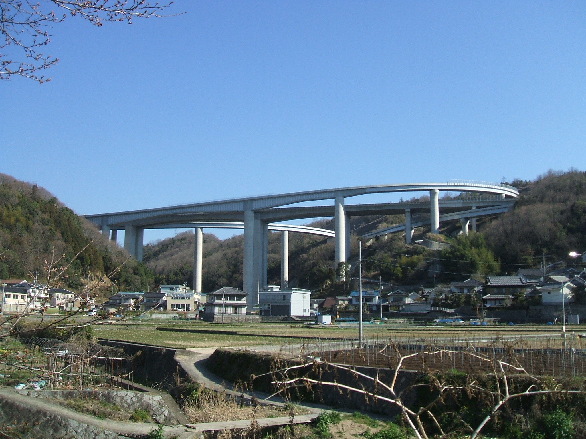 広島県尾道市にある尾道ジャンクションを南側より撮影。画面中央は山陽自動車道。北側に伸びているのは尾道自動車道である。